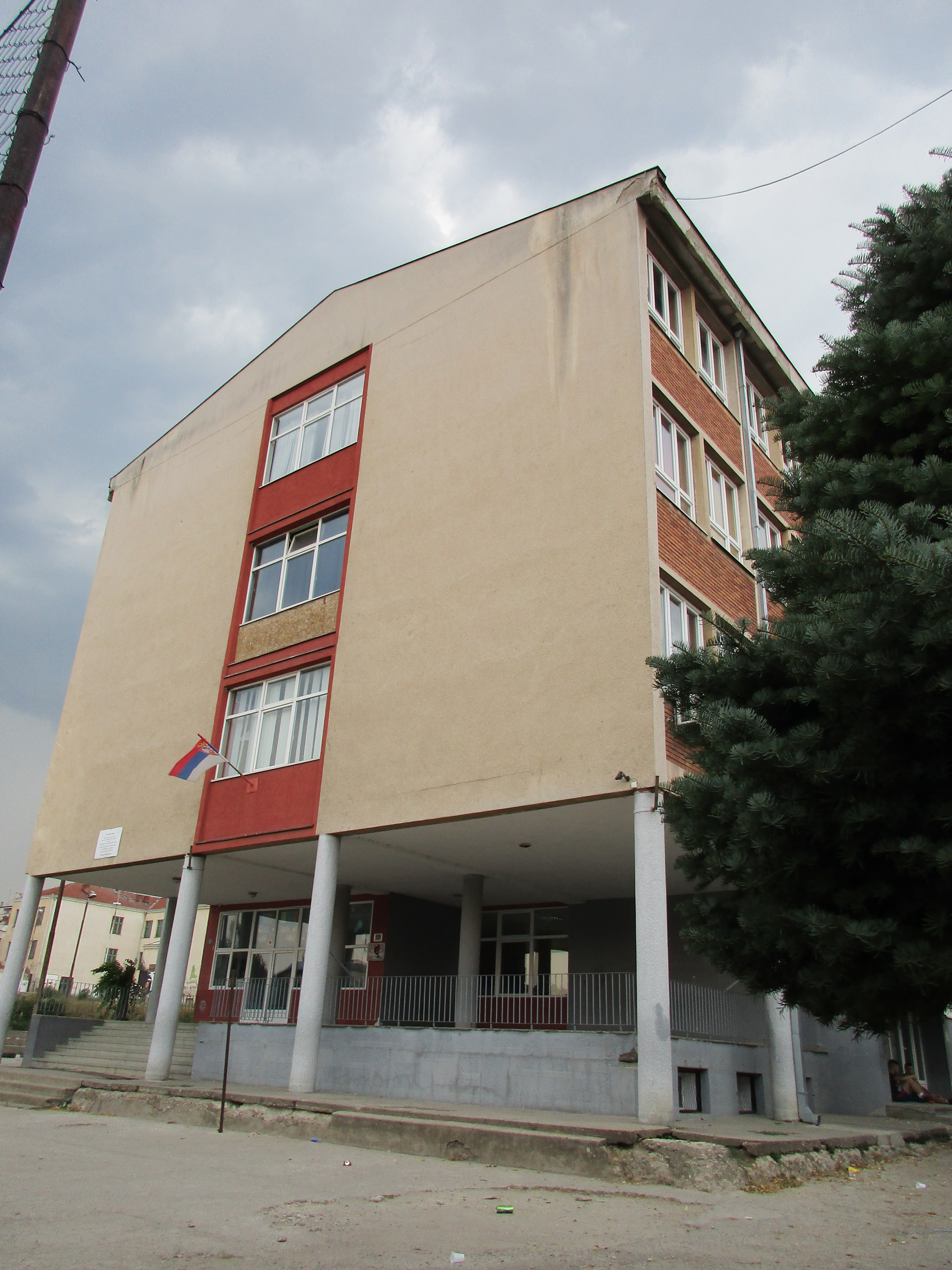 Srpski (latinica): Osnovna škola Ratko Pavlović - Ćićko, Prokuplje